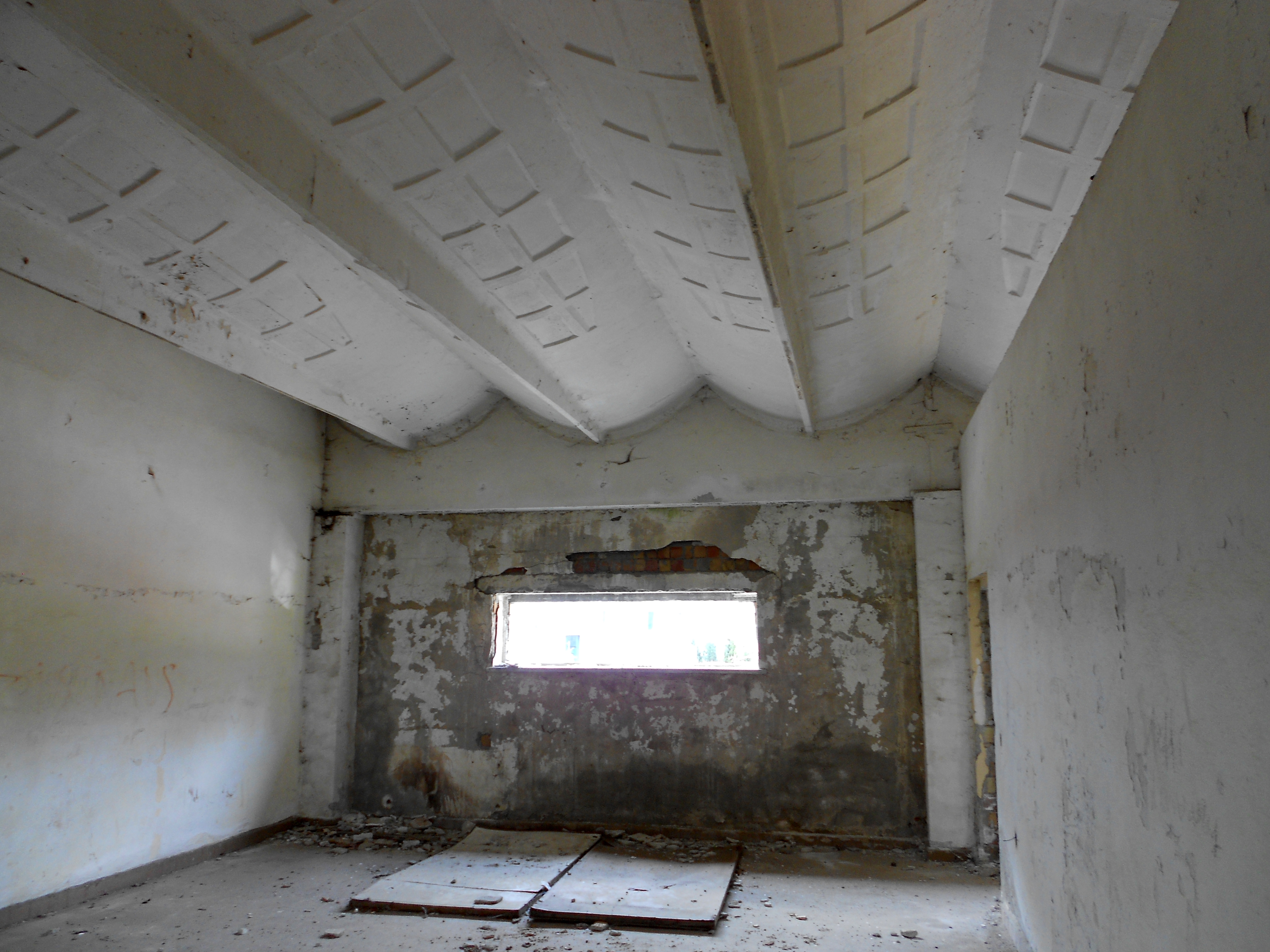 Eberswalde Südend, ehemalige Artilleriekaserne (bis 1945), sowjetische Kaserne (bis 1994), heute Landeskriminalamt, Finanzamt und andere Behörden